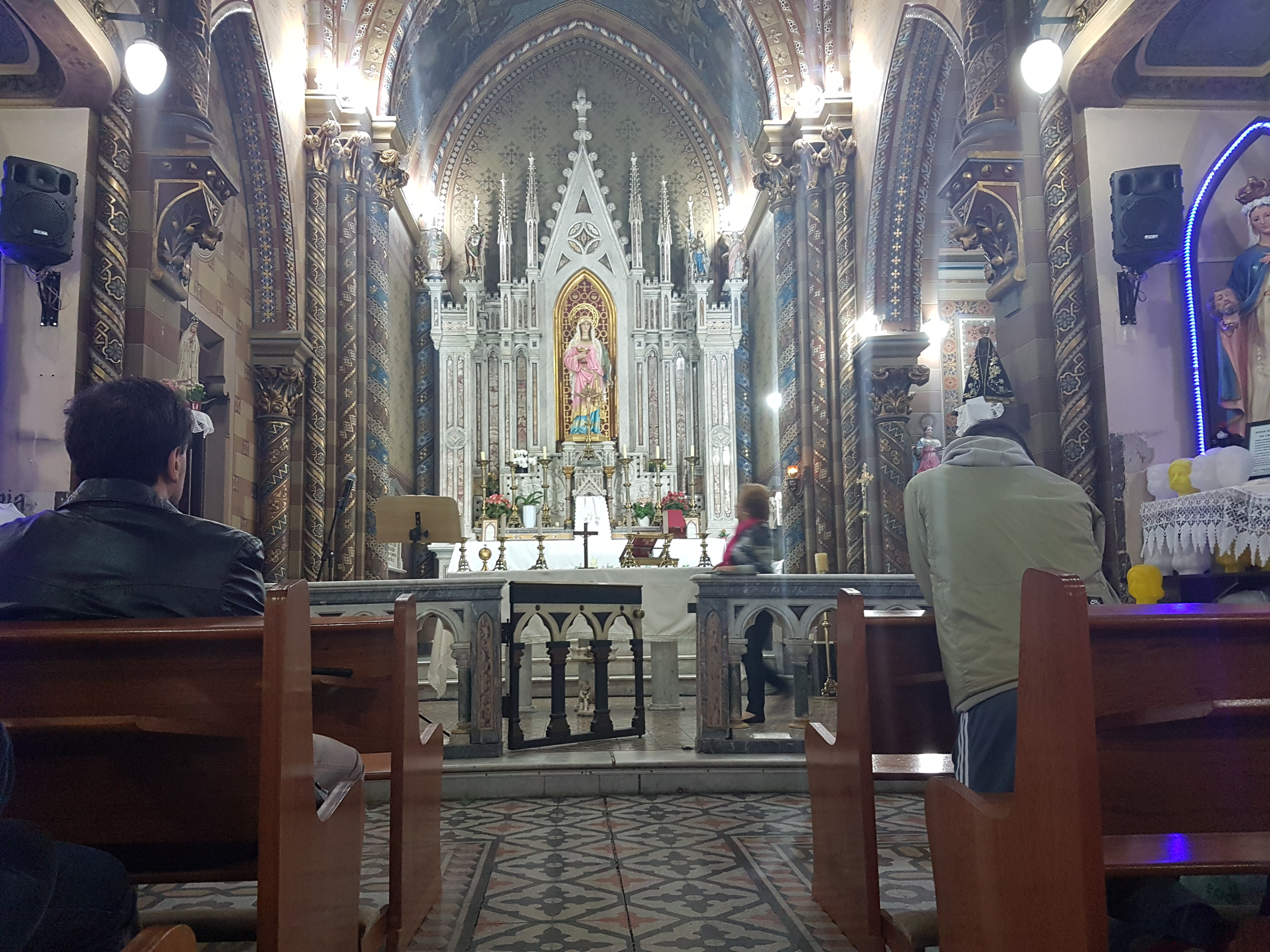 Capela do Menino Jesus e Santa Luzia, situada na Rua Tabatringuera, 104, região da Sé.